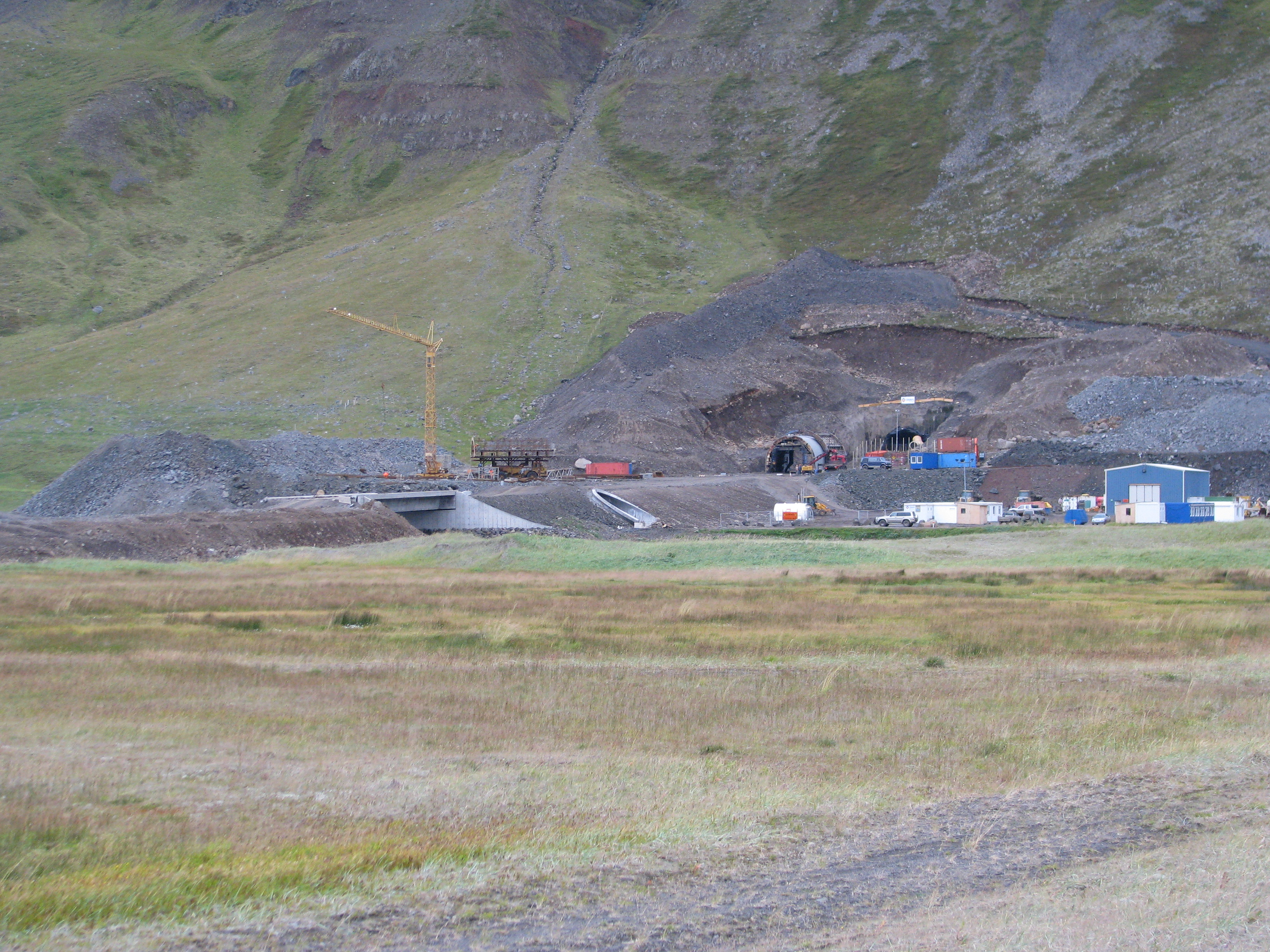 Tunnel under construction, Northern Iceland